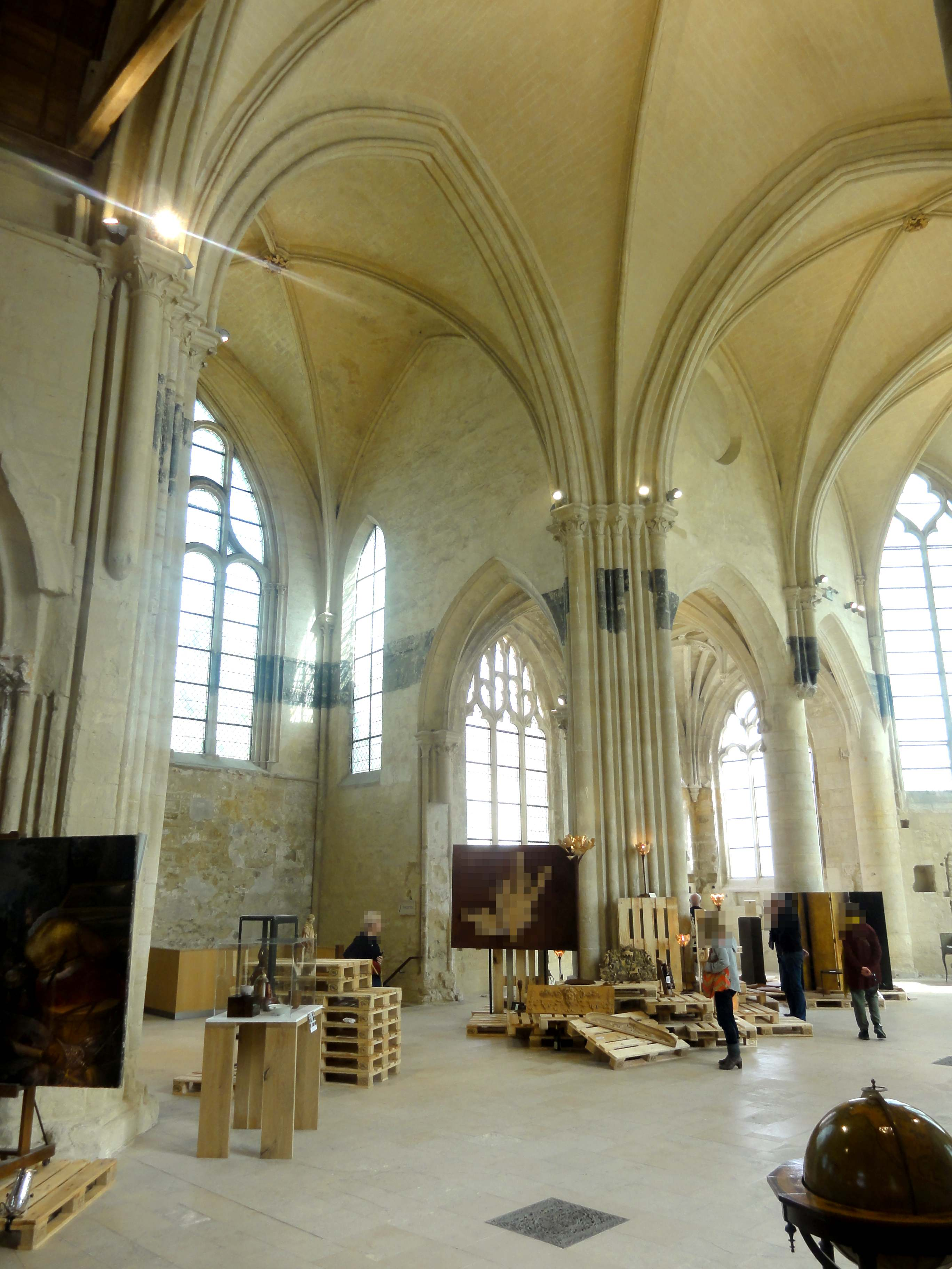 Intérieur de l'église - voir titre.